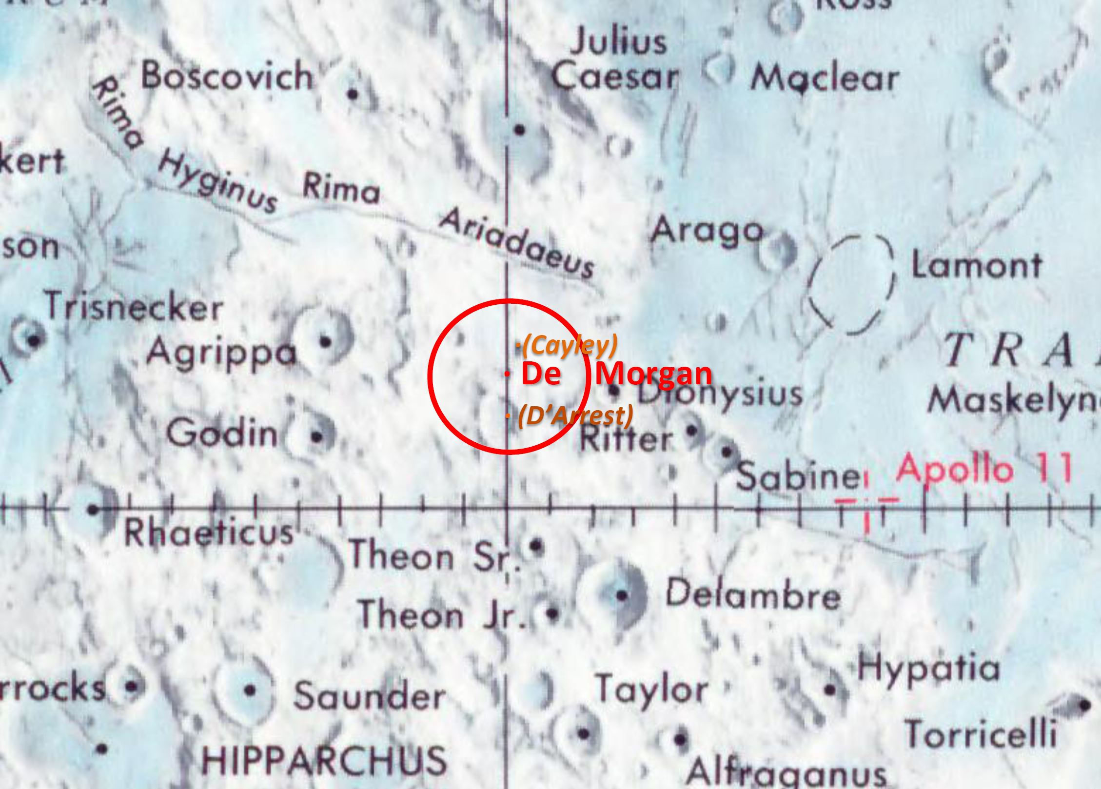 Cráter De Morgan. Detalle de la imagen Moonmap from Moon Map - Equatorial region 45S to 45N - LPC1 - NASA